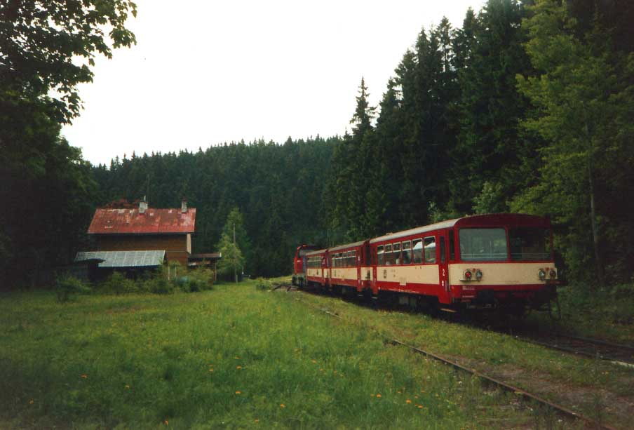 Vlak opouští zastávku Pernink ve směru Karlovy Vary